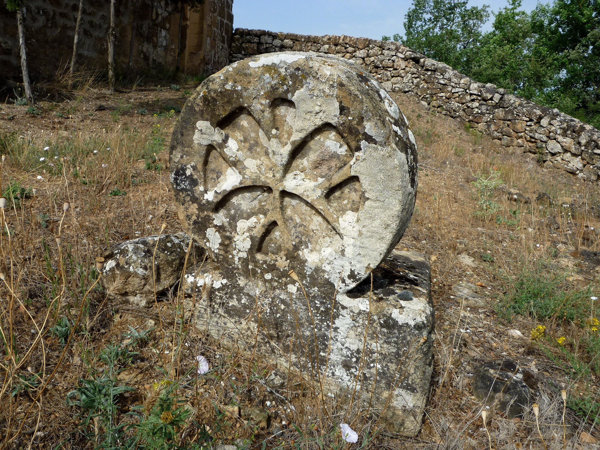 Església de Sant Pere del Pujol (Torrefeta i Florejacs): estela discoïdal